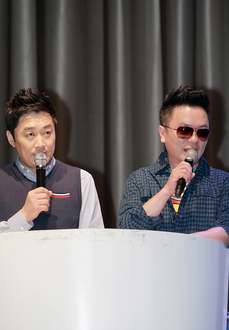 개그맨, 가수 컬투